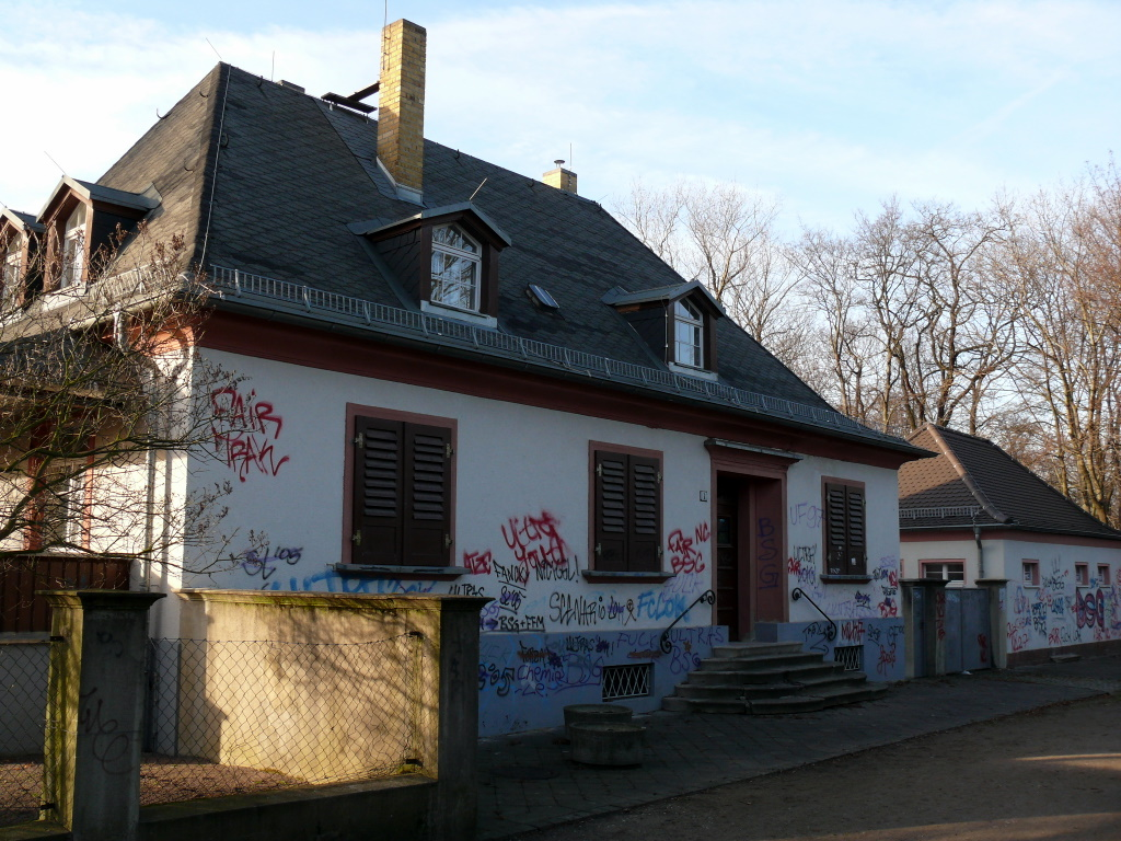 Wirtschaftsgebäude des Grünflächenamtes im Mariannenpark Leipzig.